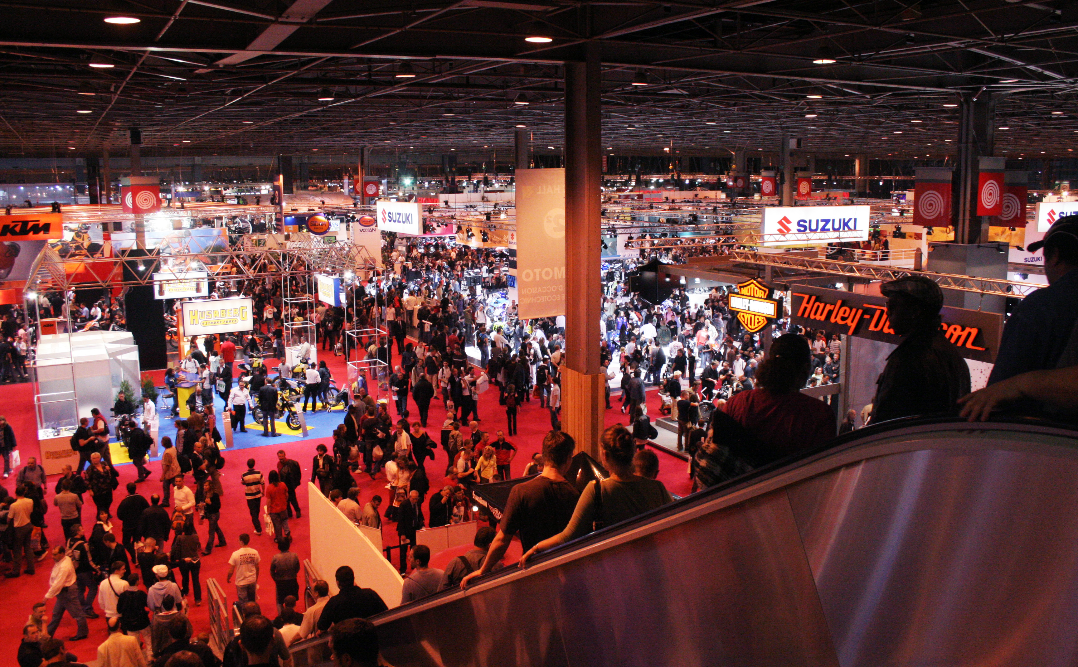 Salon de la moto d'octobre 2007, à Paris, Porte de Versailles